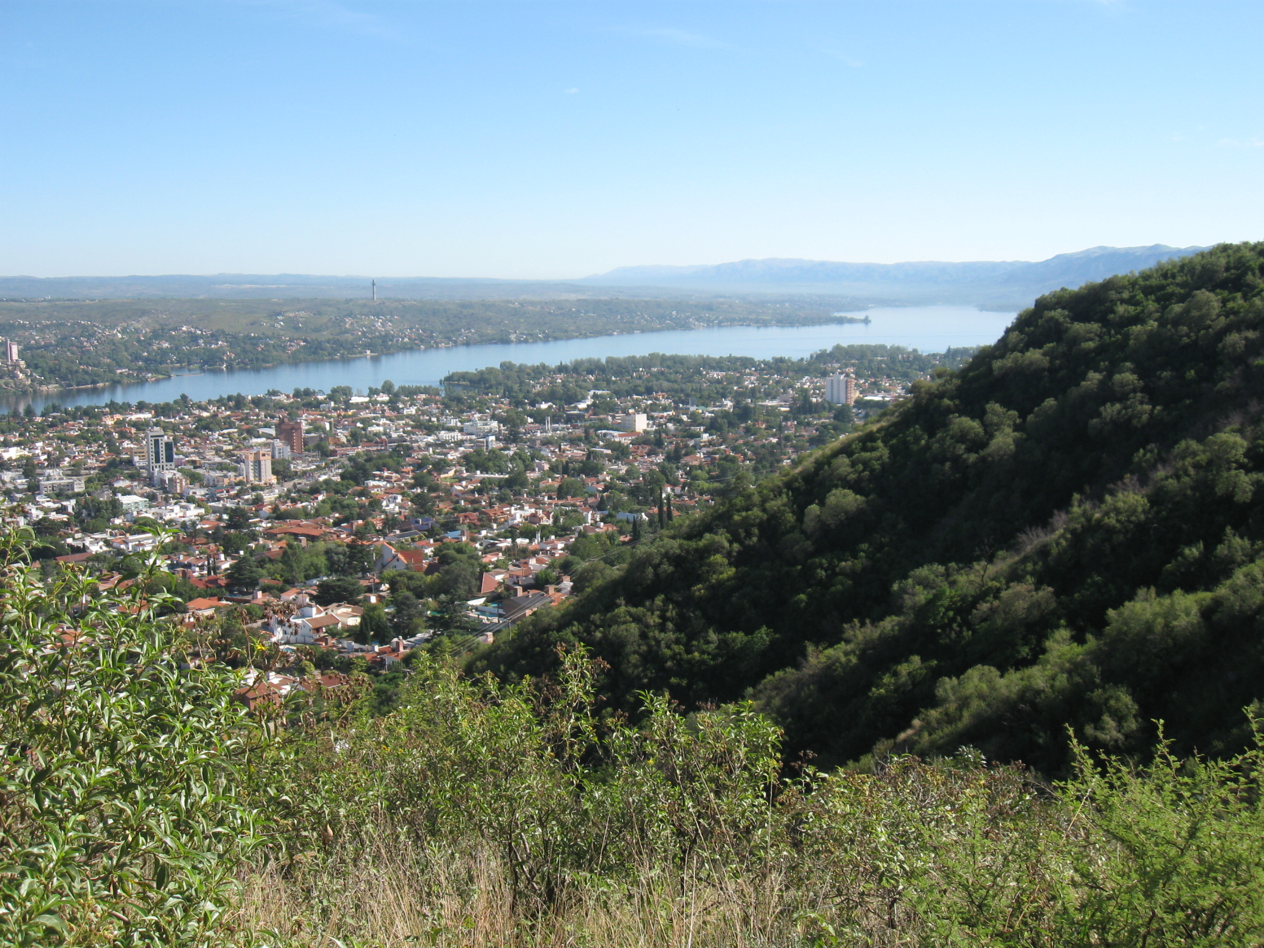 La capital del Valle de Punilla en una imagen desde la montaña.